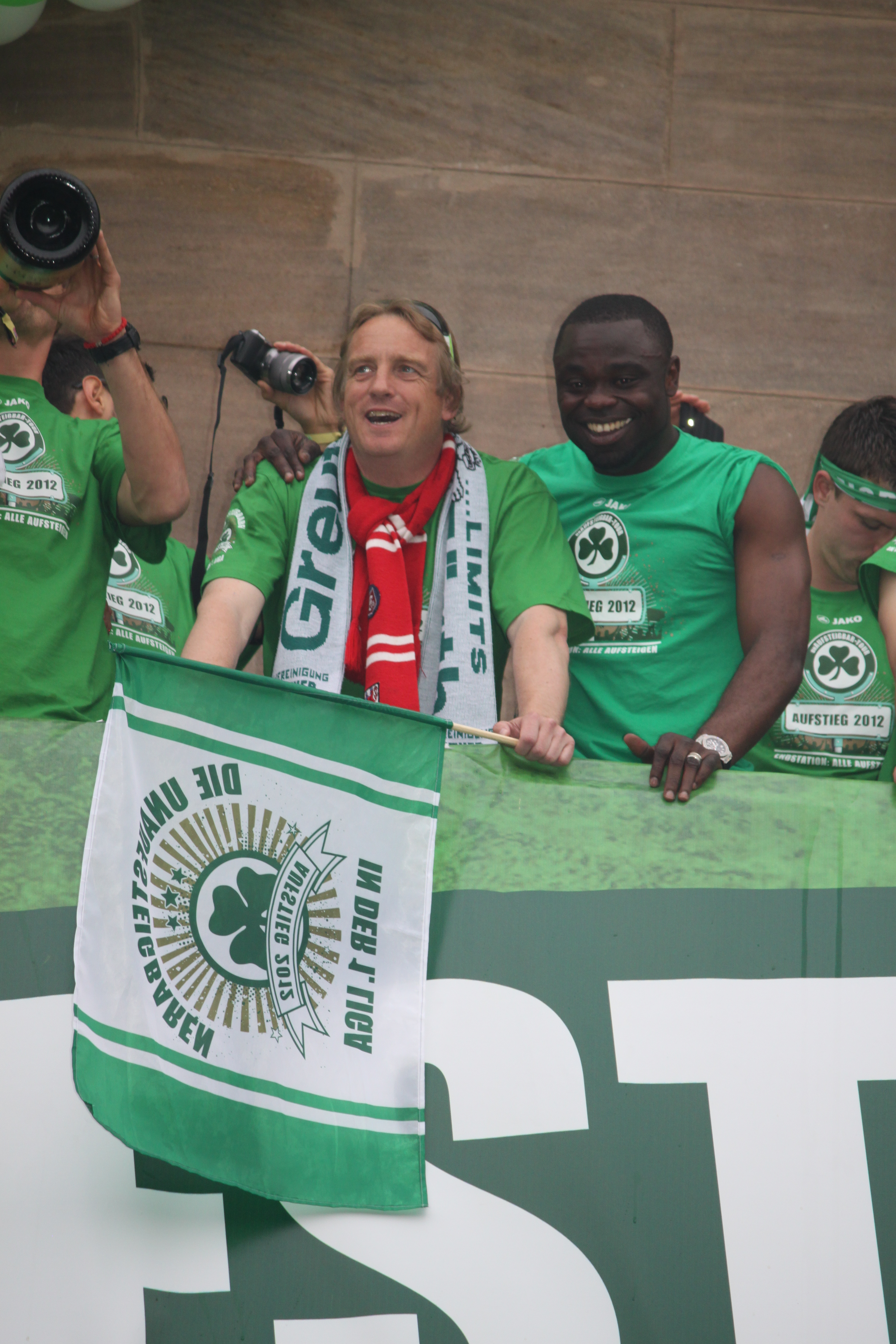 Mike Büskens u. Gerald Asamoah auf dem Fürther Rathausbalkon bei der Aufstiegsfeier der SpVgg Fürth am 29.04.2012